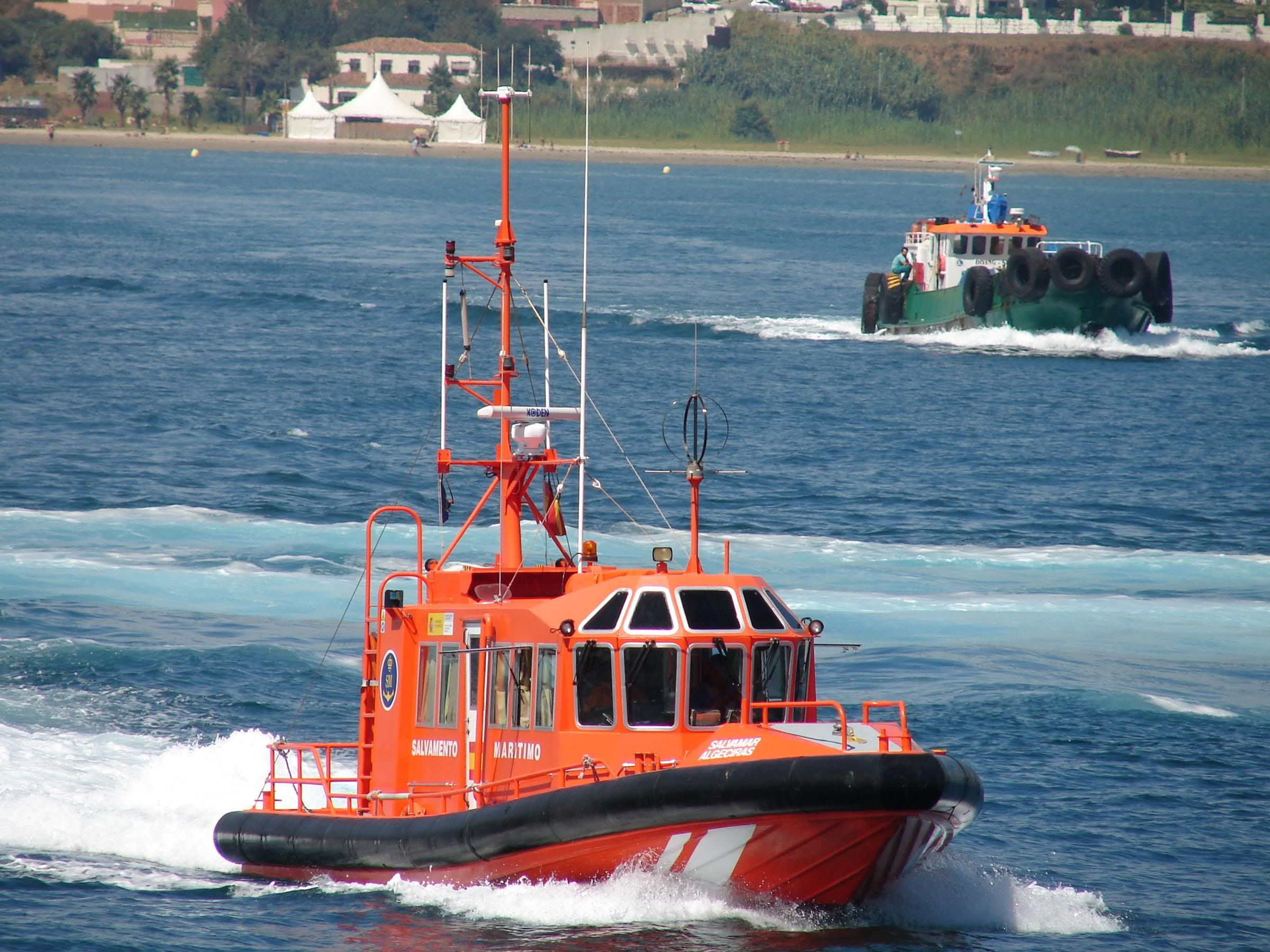 Salvamar Al geciras en el puerto homónimo